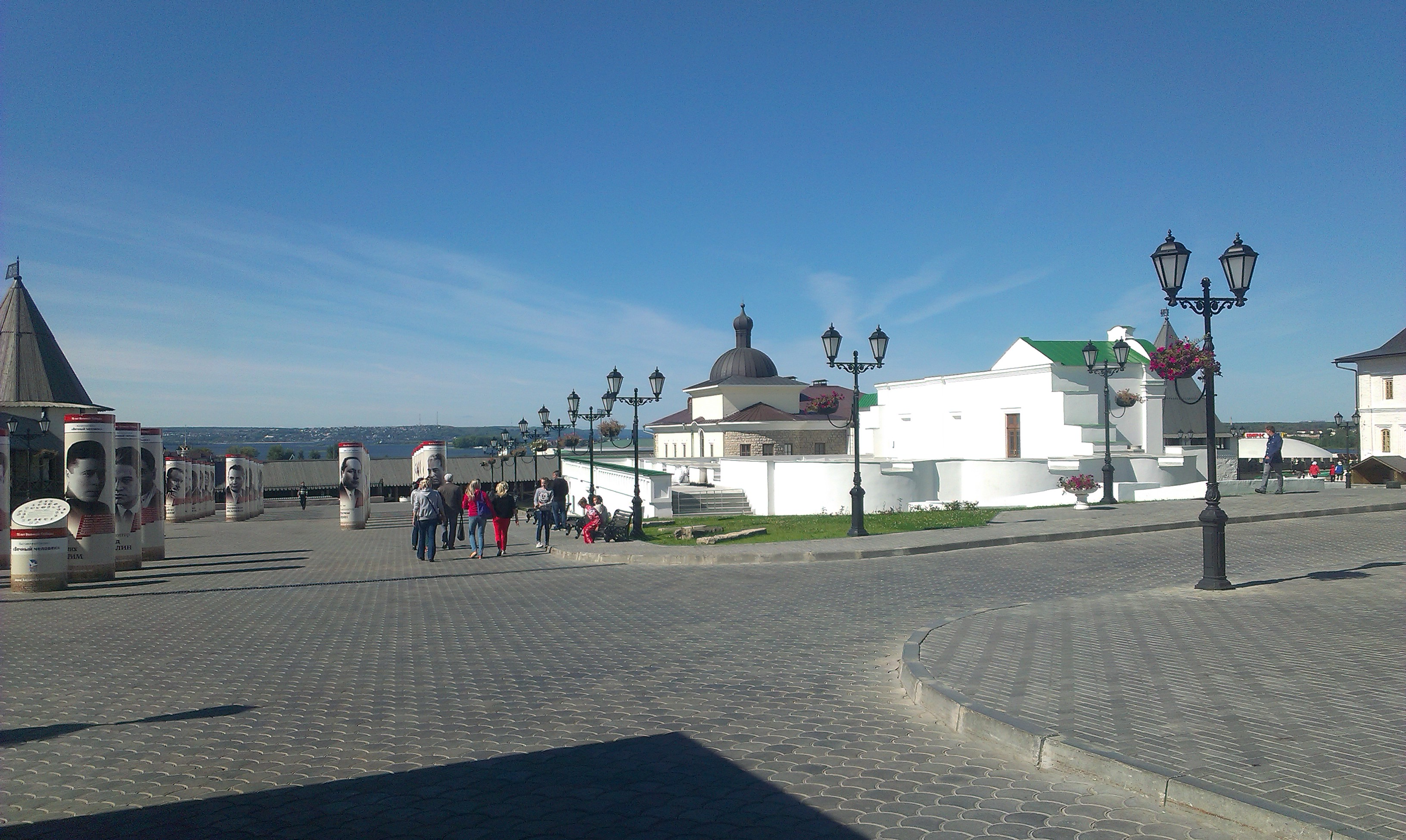 Казанский кремль